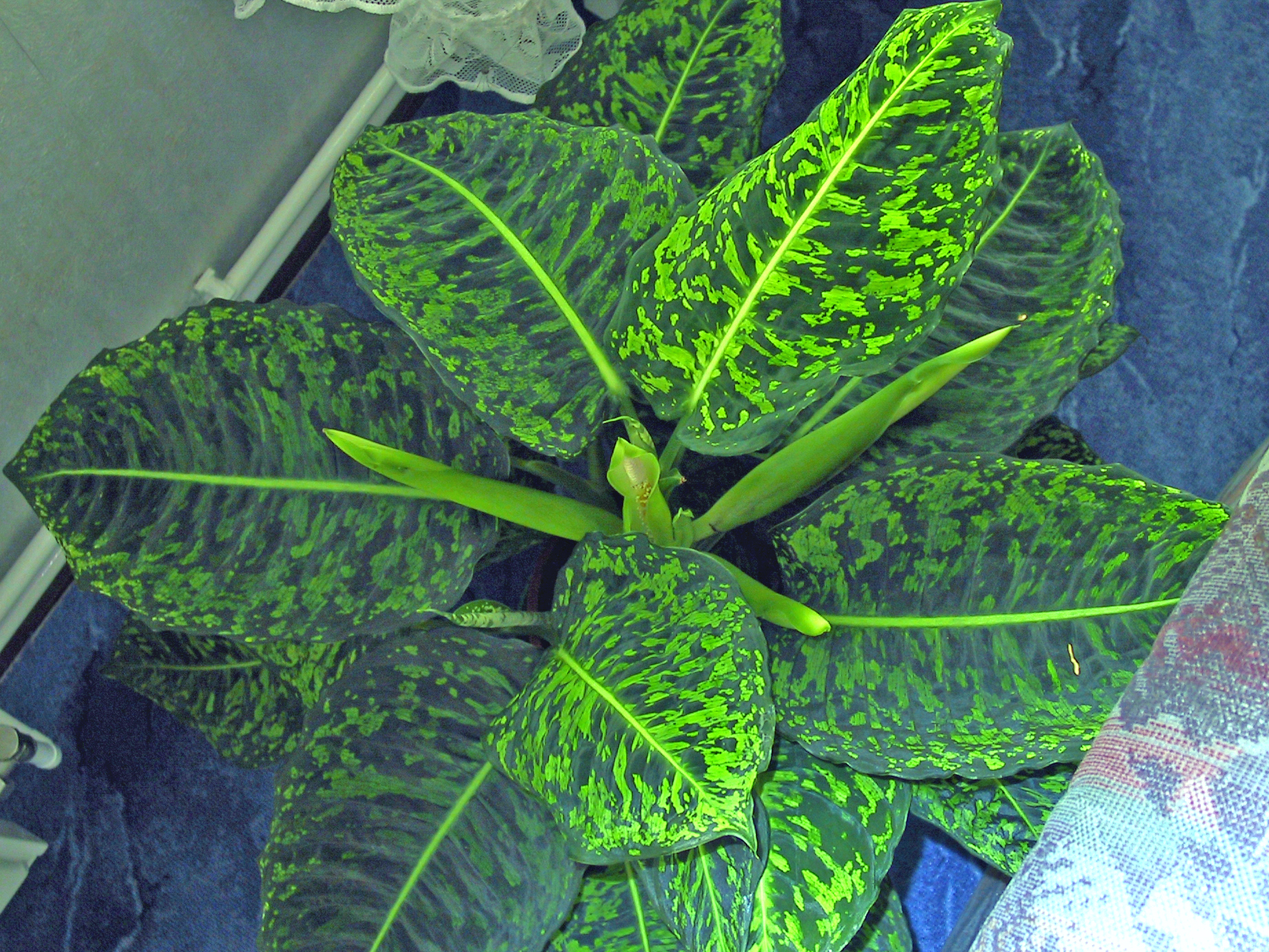 Dieffenbachia mit Blüten